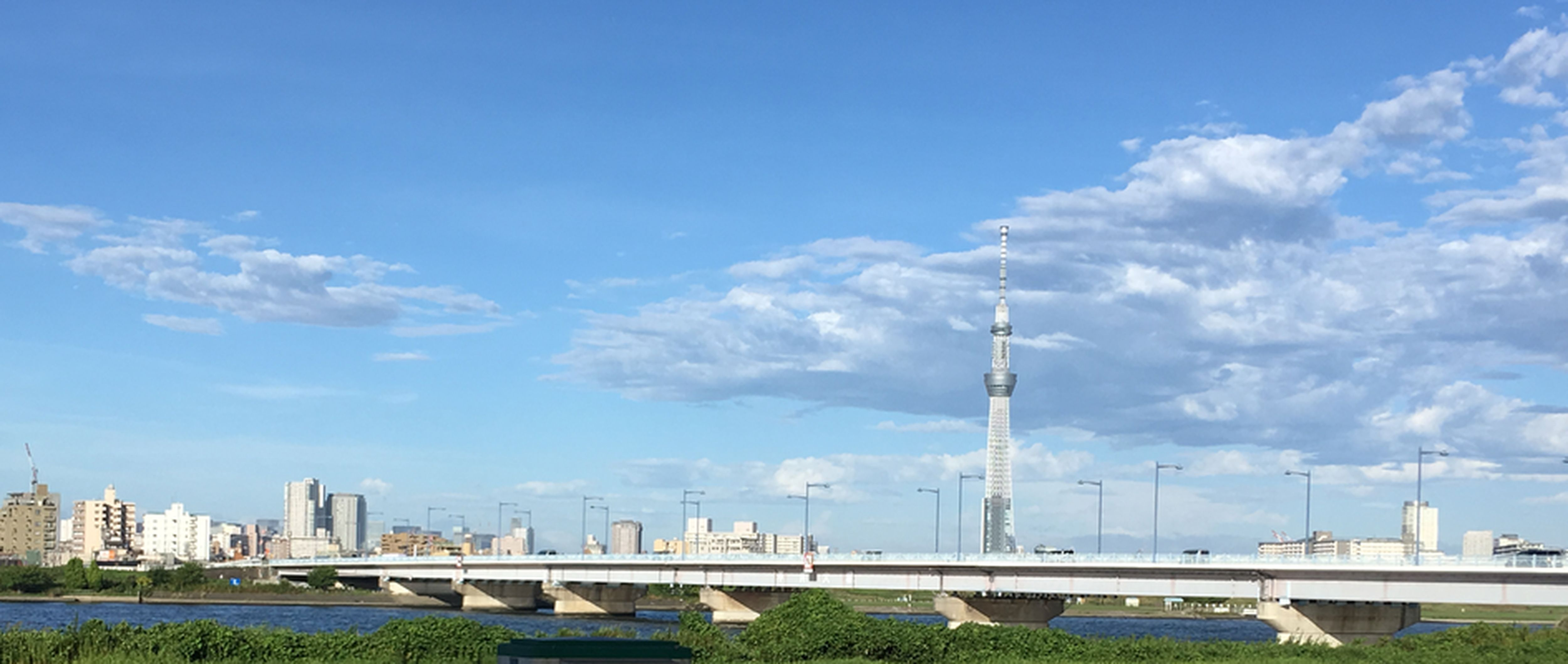 東京都の荒川に架かる平井大橋